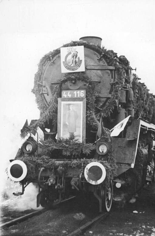 Dampflok 44 116 (BR 44) Illus Illner 18.12.50 Zum Monat der deutsch-sowjetischen Freundschaft. Freundschaftszug der DDR fährt in die Sowjet-Union. Zu Ehren des Geburtstages von Generalissimus Stalin fuhr am 17.12.1950 der Held der Arbeit, Oberlokführer Paul Heine, den 2500 Tonnen schweren Freundschaftszug von Leipzig über Halle - Magdeburg - Berlin - Frankfurt-Oder nach Brest-Litowsk. In Halle, Magdeburg und Halberstadt überreichten Delegationen der Reichsbahn Oberlokführer Heine Geschenke und Telegramme für Generalissimus Stalin. UBz: Die festlich geschmückte Lok des Freundschaftszuges.